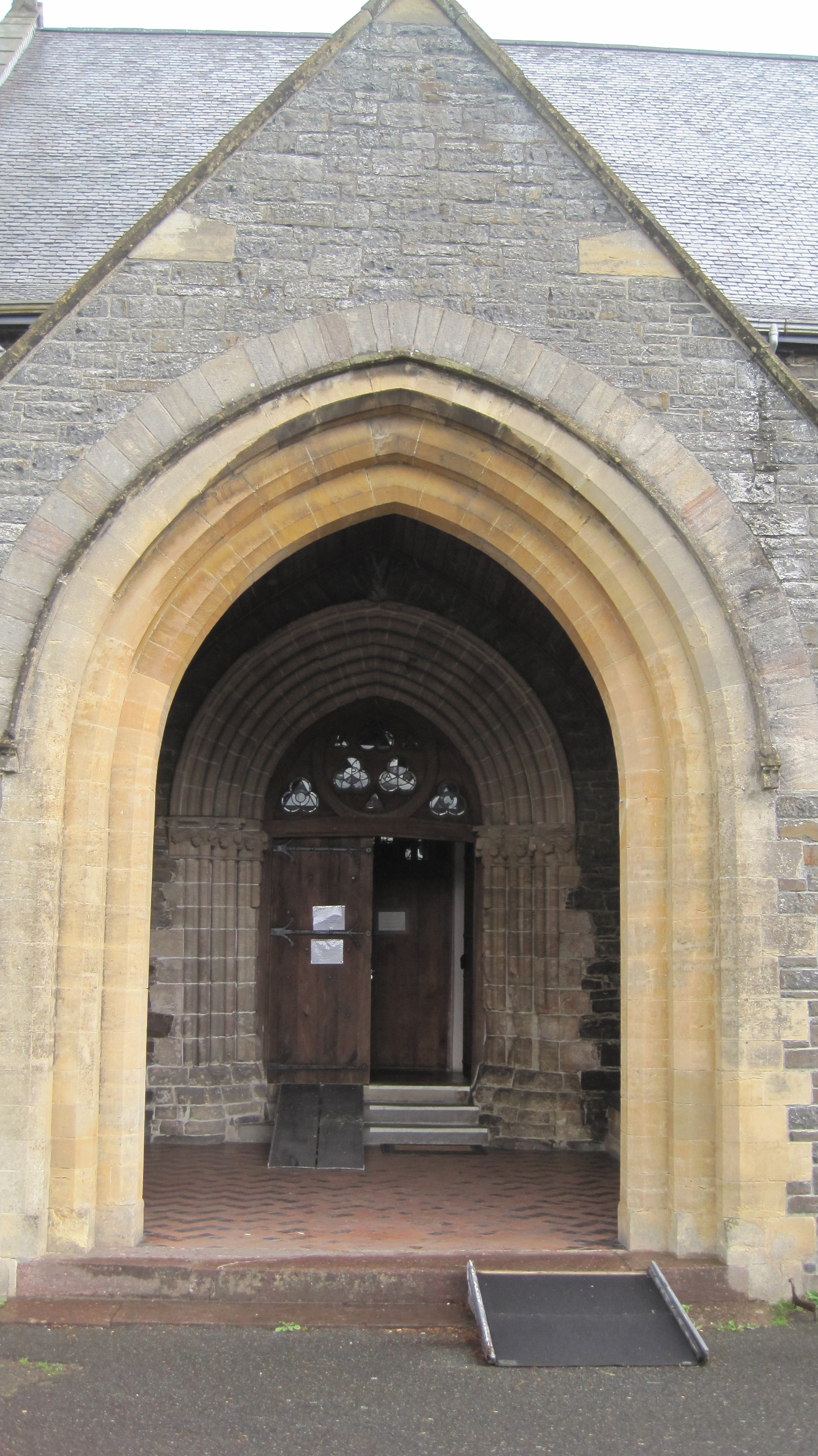 Egwys Llanbadarn Fawr, Abersytwyth. Y porth